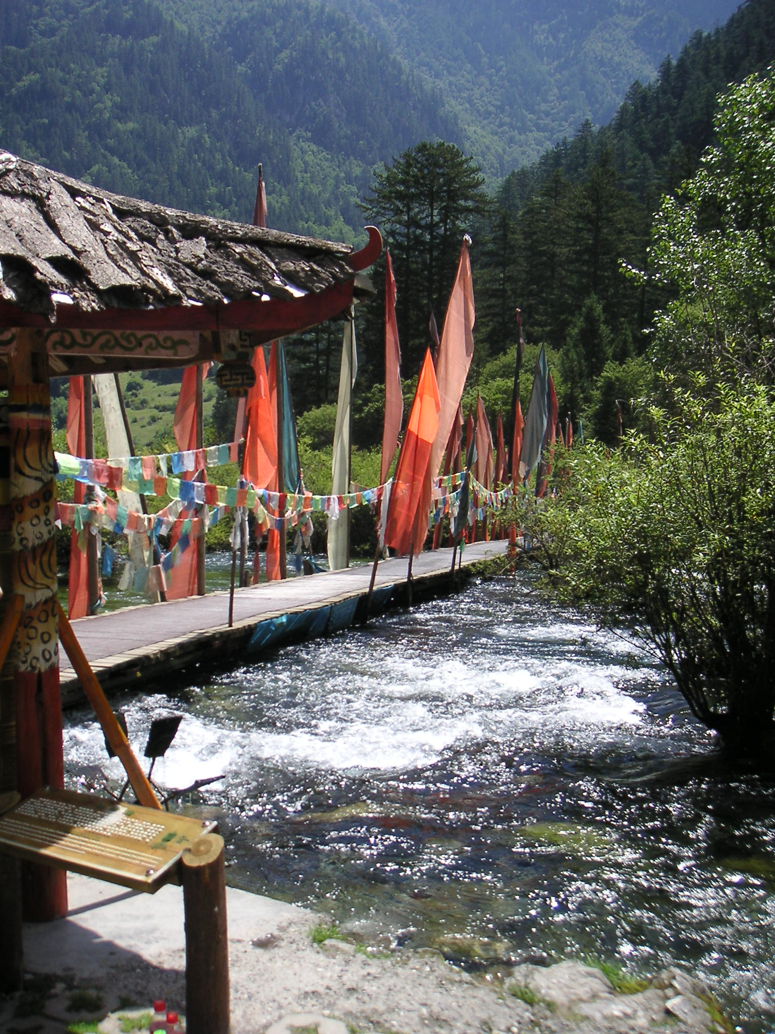 Brücke in Jiuzhaigo